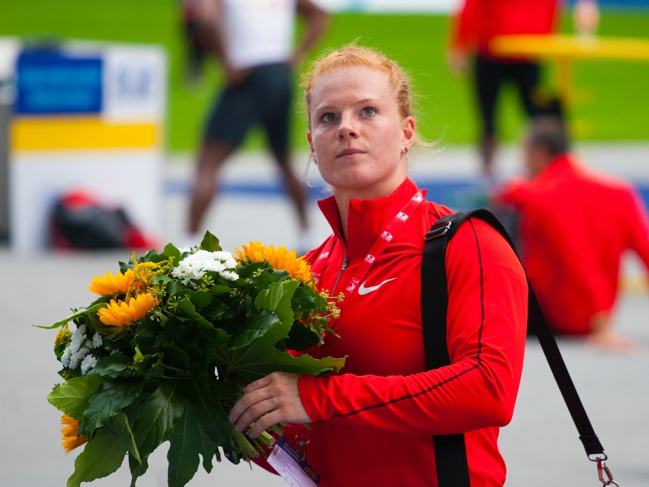 Betty Heidler, Hammerwerfen